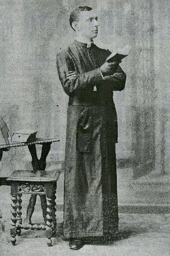 Feld Zsigmond magyar színész, színházigazgató.